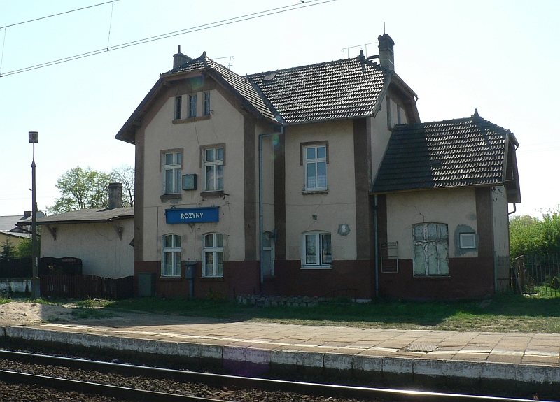 Dworzec na przystanku kolejowym Różyny